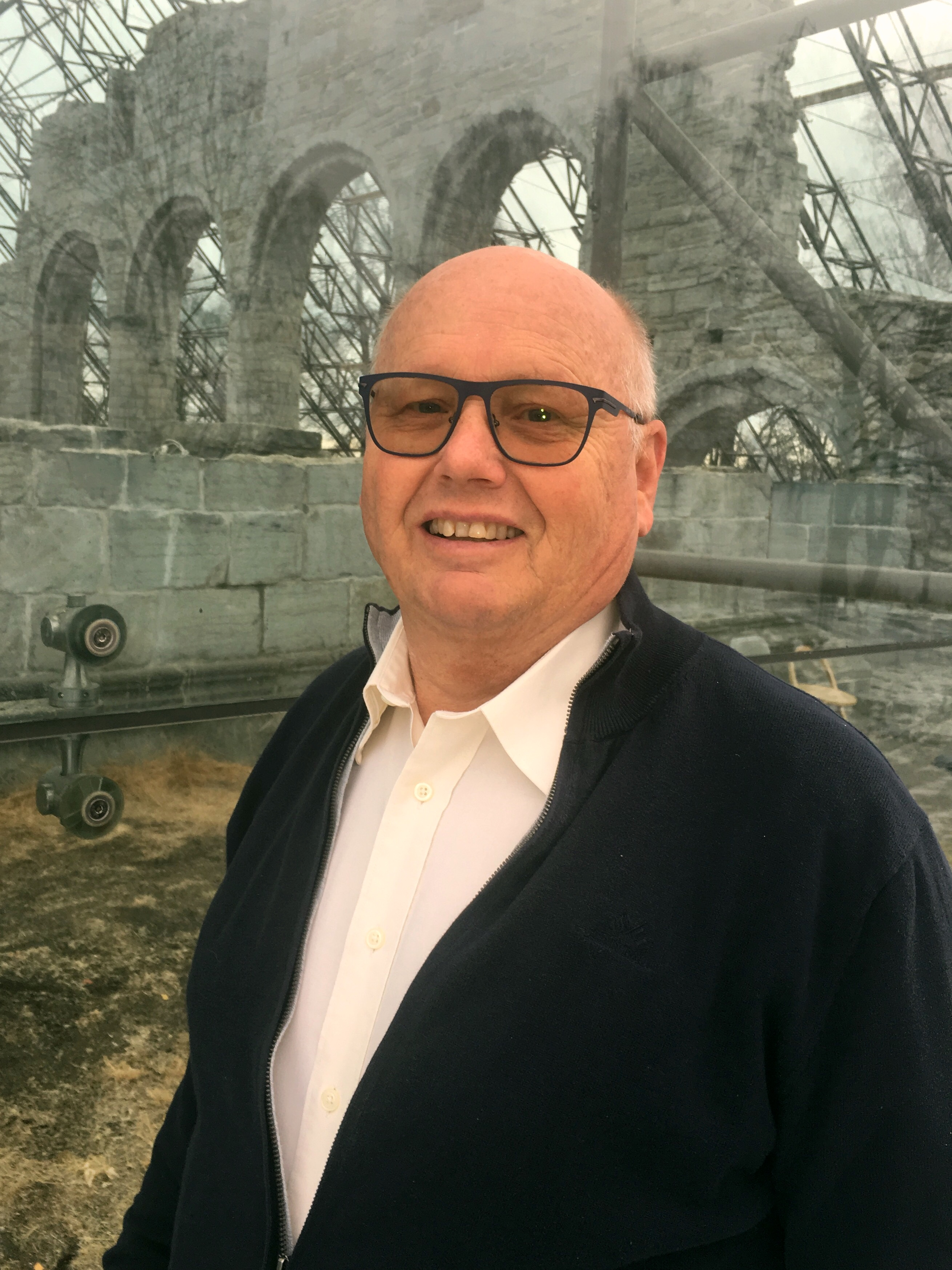 Førstekandidat Hedmark KrF, Stortingsvalget 2017